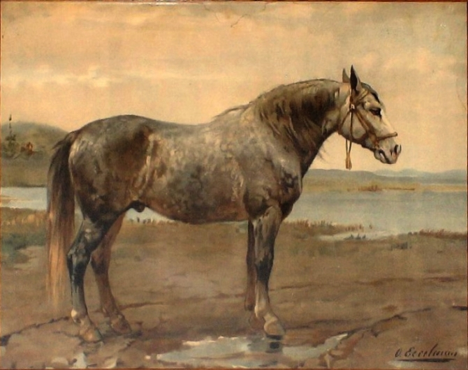 Russian draft